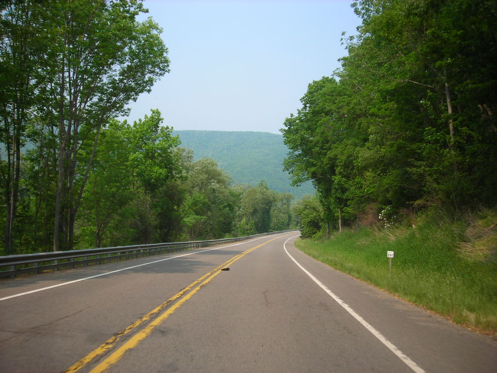 US Route 6 - Pennsylvania